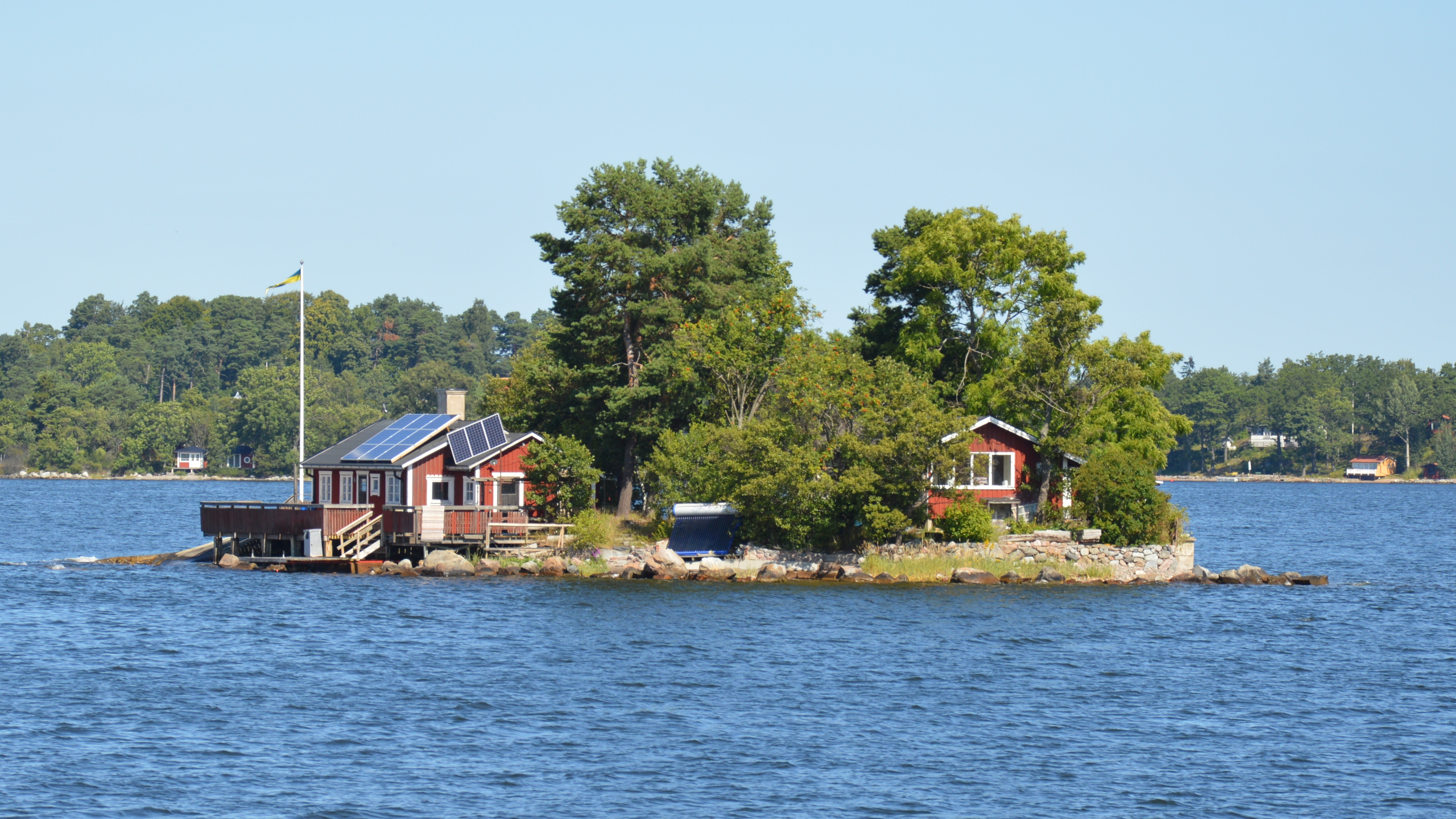 Insel Kattholmen